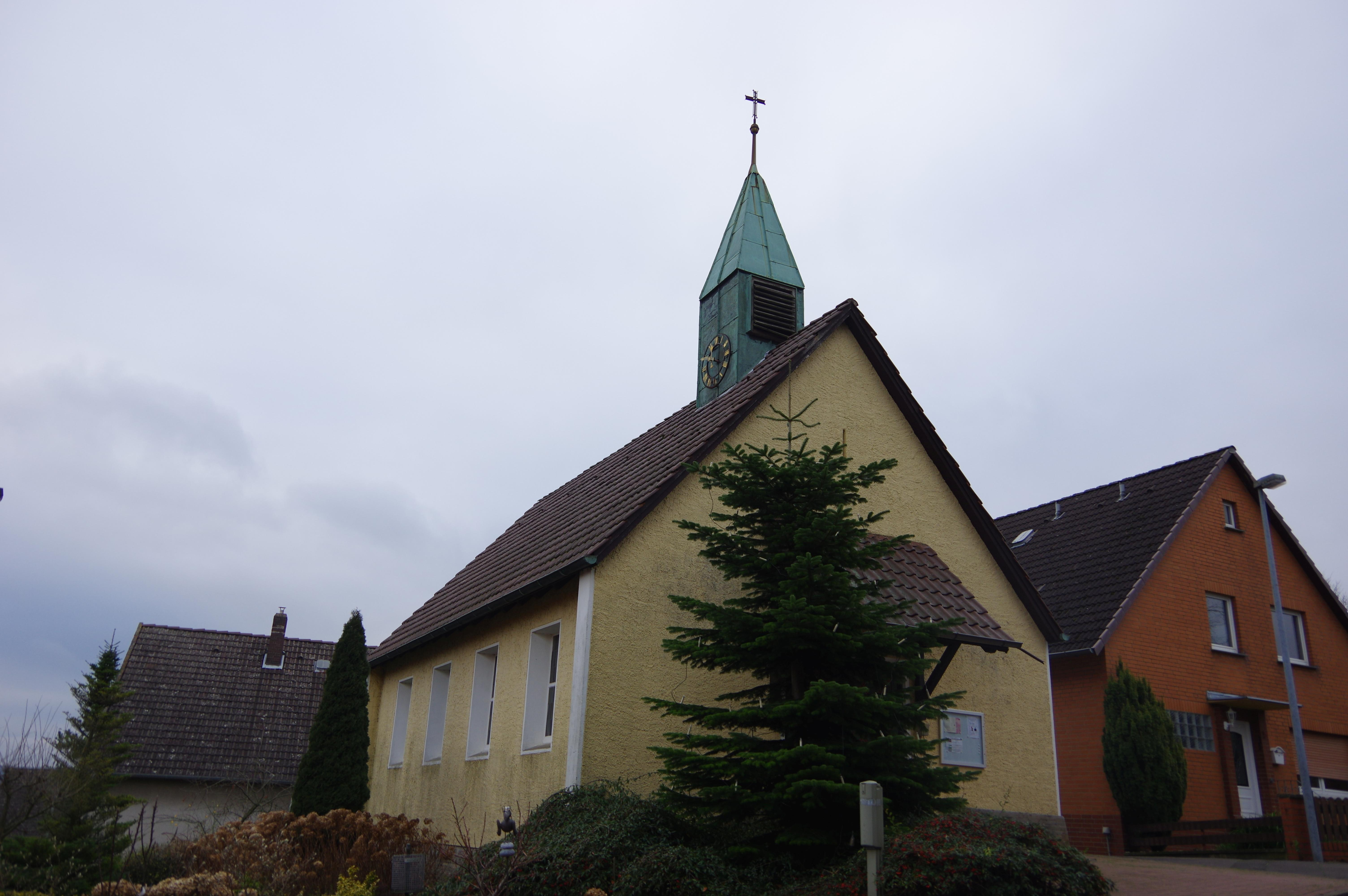 Duingen in Niedersachsen. Die Kapelle im Ortsteil Fölziehausen.